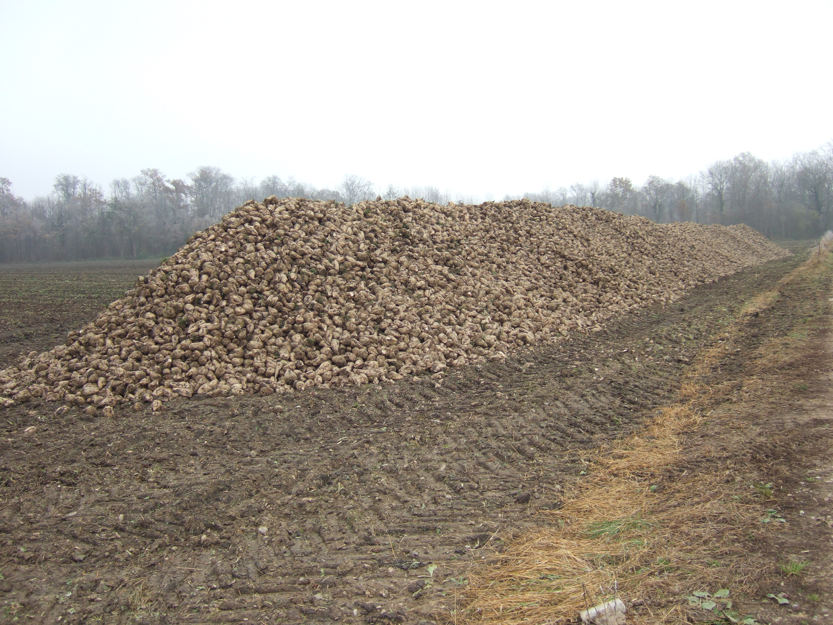 C'est une des cultures importantes des exploitants locaux proches de la sucrerie d'Erstein.